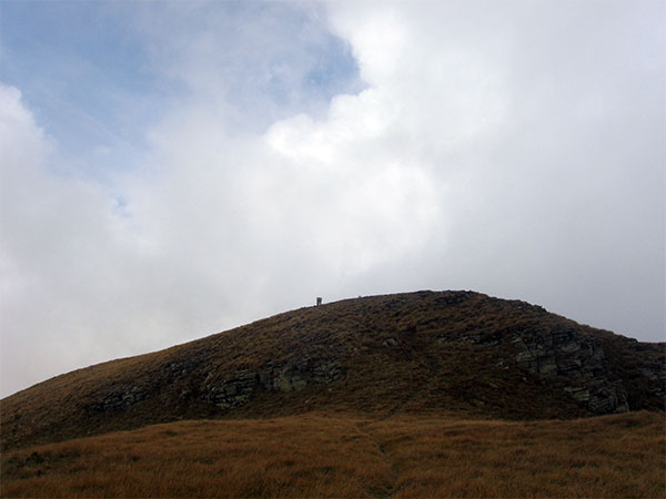 Stara planina - Midzor